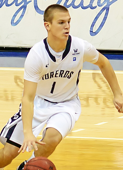 Johnny Dee